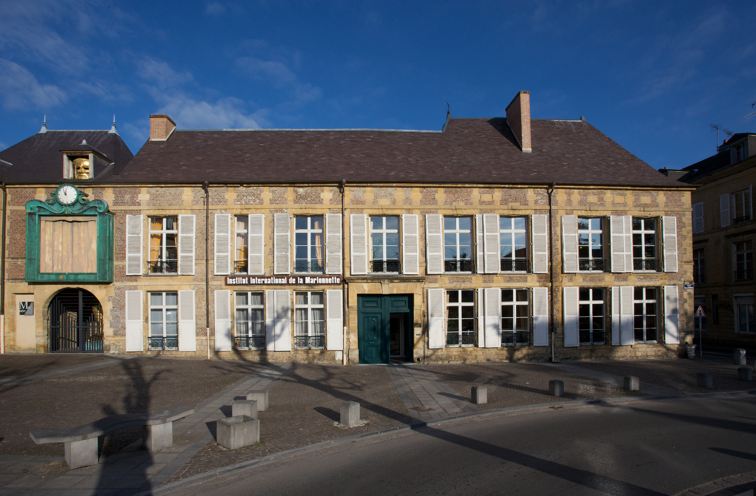 Façade iim Christophe Loiseau